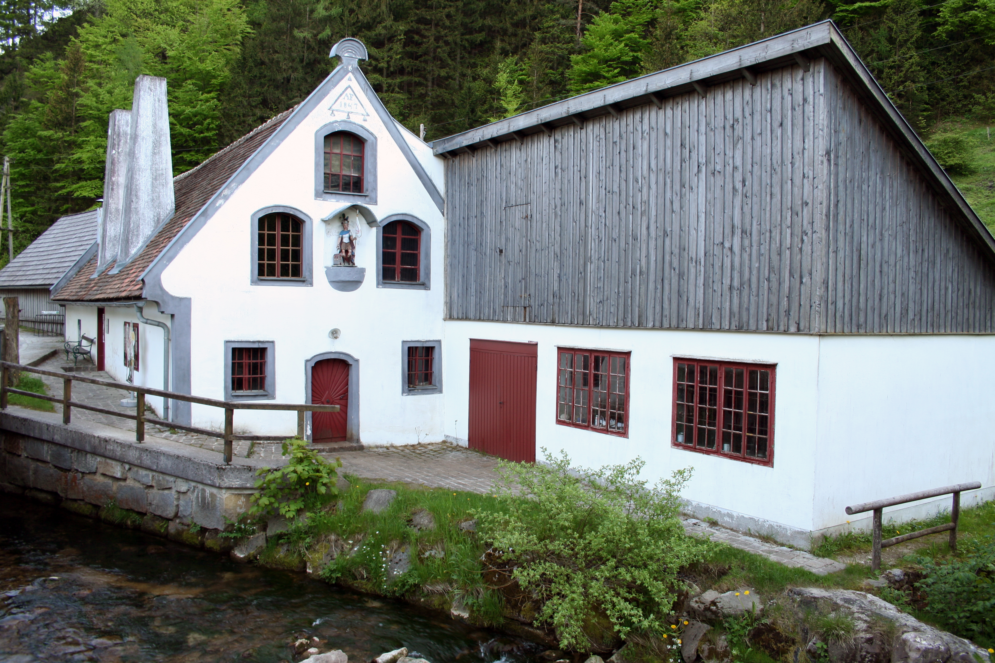 Fahrngruber Hammer in Ybbsitz